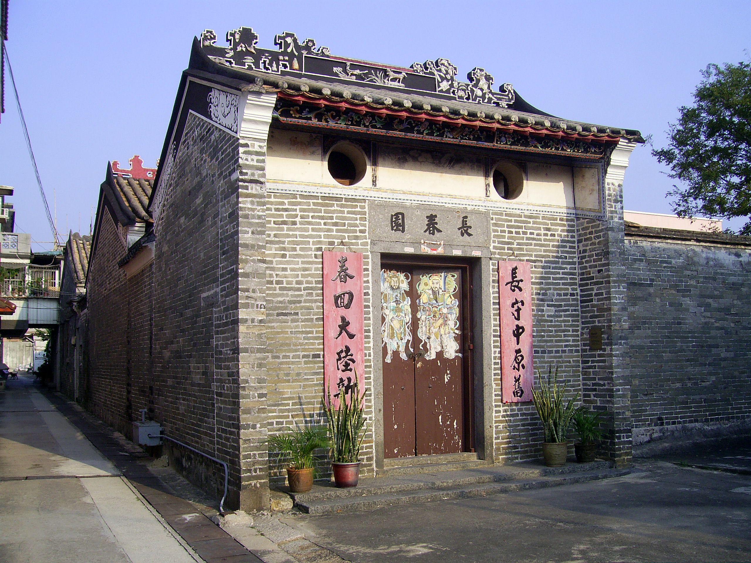 中文（香港）: 長春園